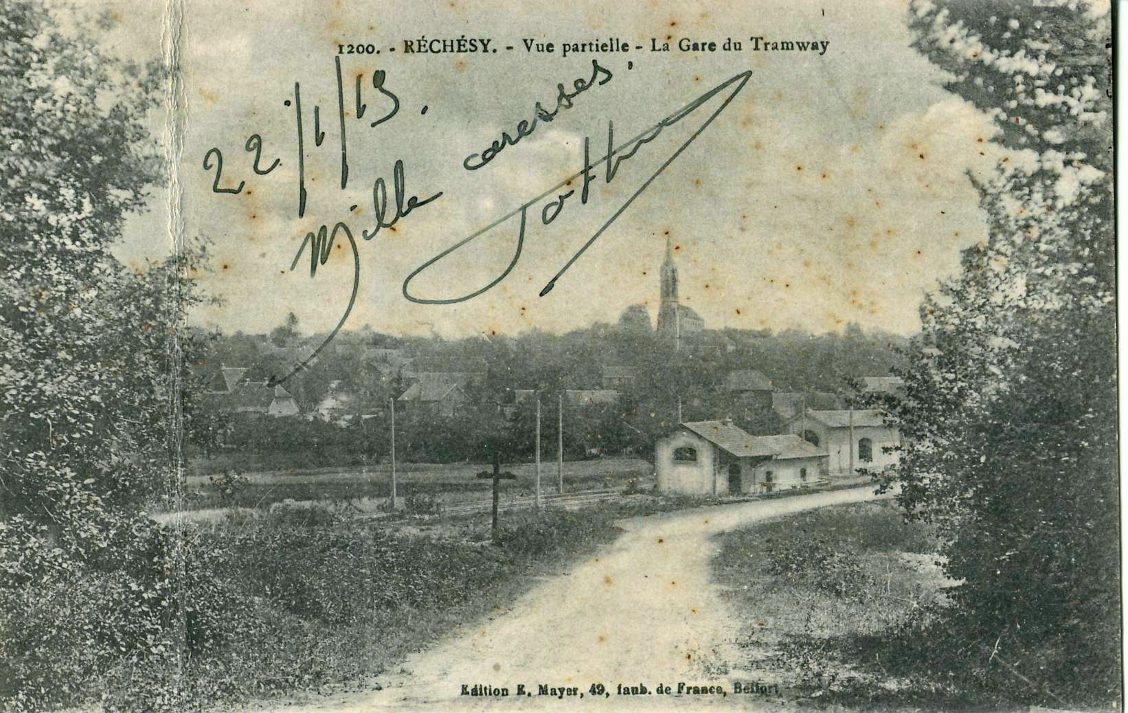 Carte postale ancienne éditée par E. Mayer, 49 fbg de France à Belfort, n°1200 : RÉCHÉSY - Vue partielle - La Gare du Tramway